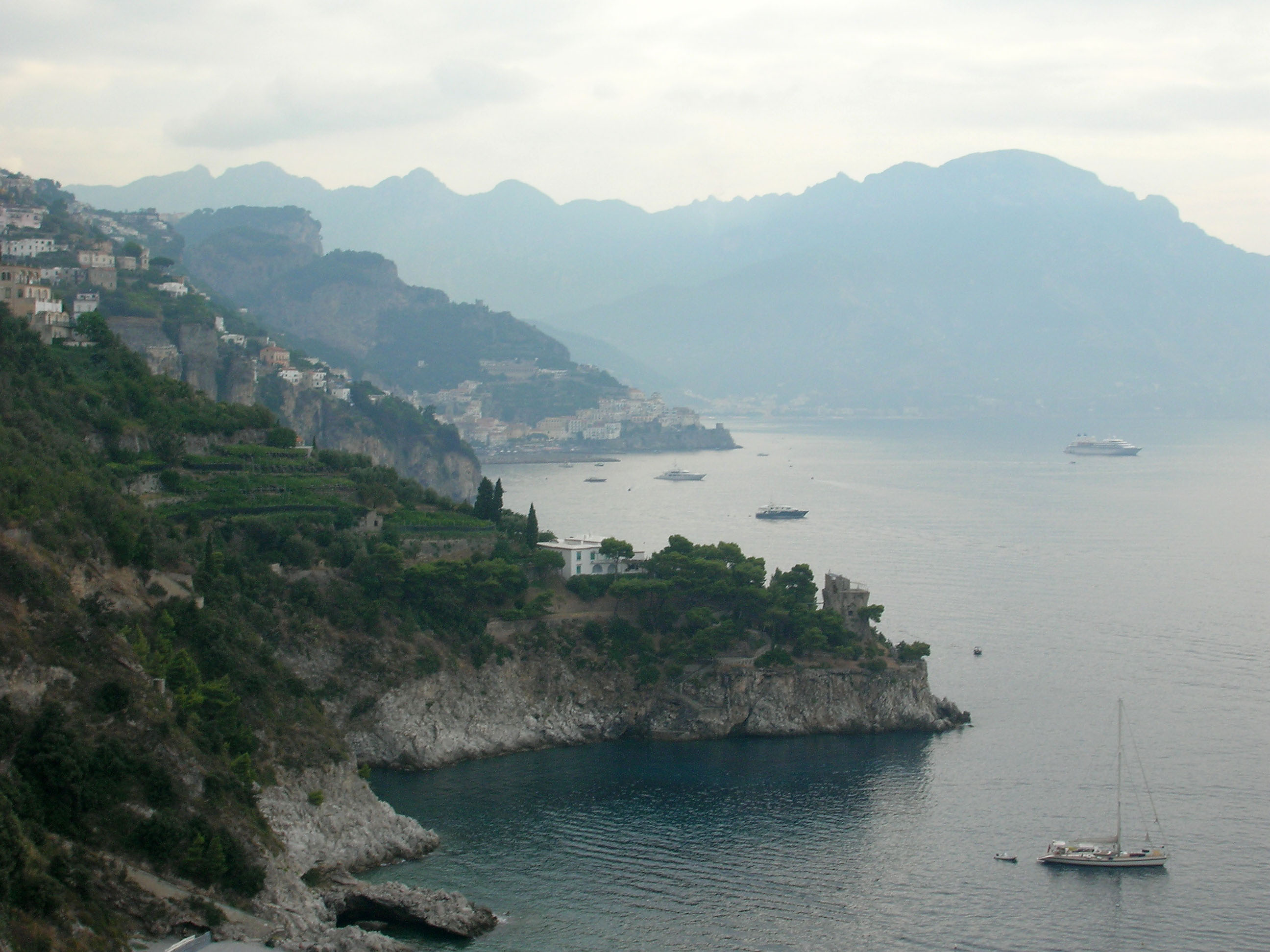 Aner Vue vun der Amalfitana Küstestrooss aus (An der Mëtt um Hiwwel d'Villa vum Sophia Loren.